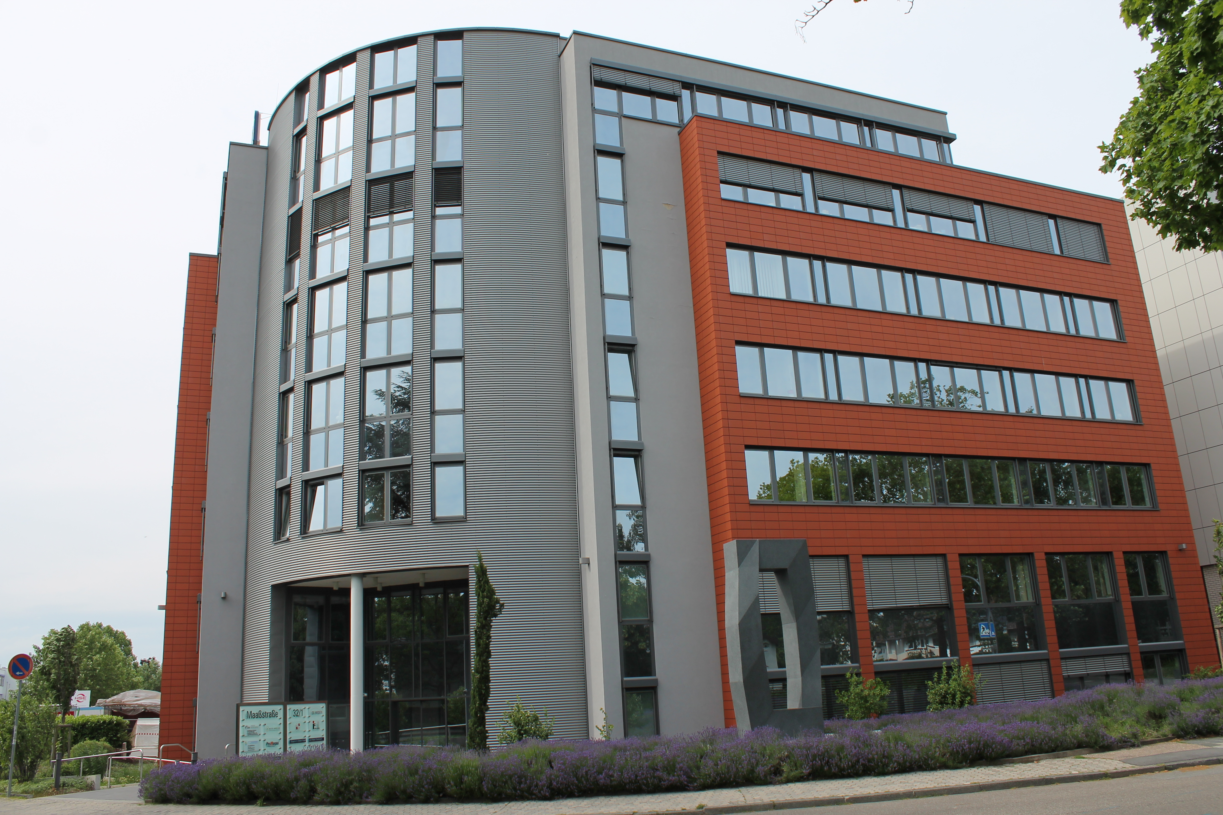 Sitz des Kaden Verlags in Heidelberg